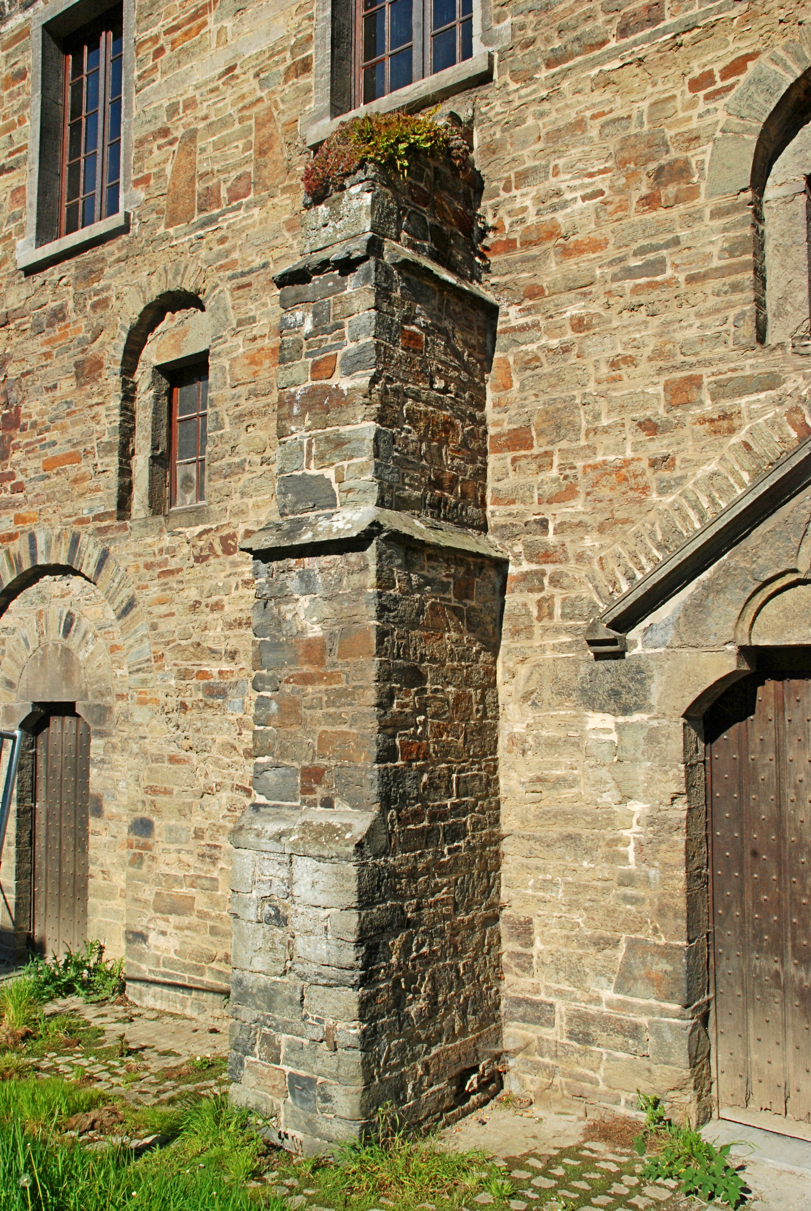 Belgique- Brabant wallon - Villers-la-Ville - ancien moulin abbatial